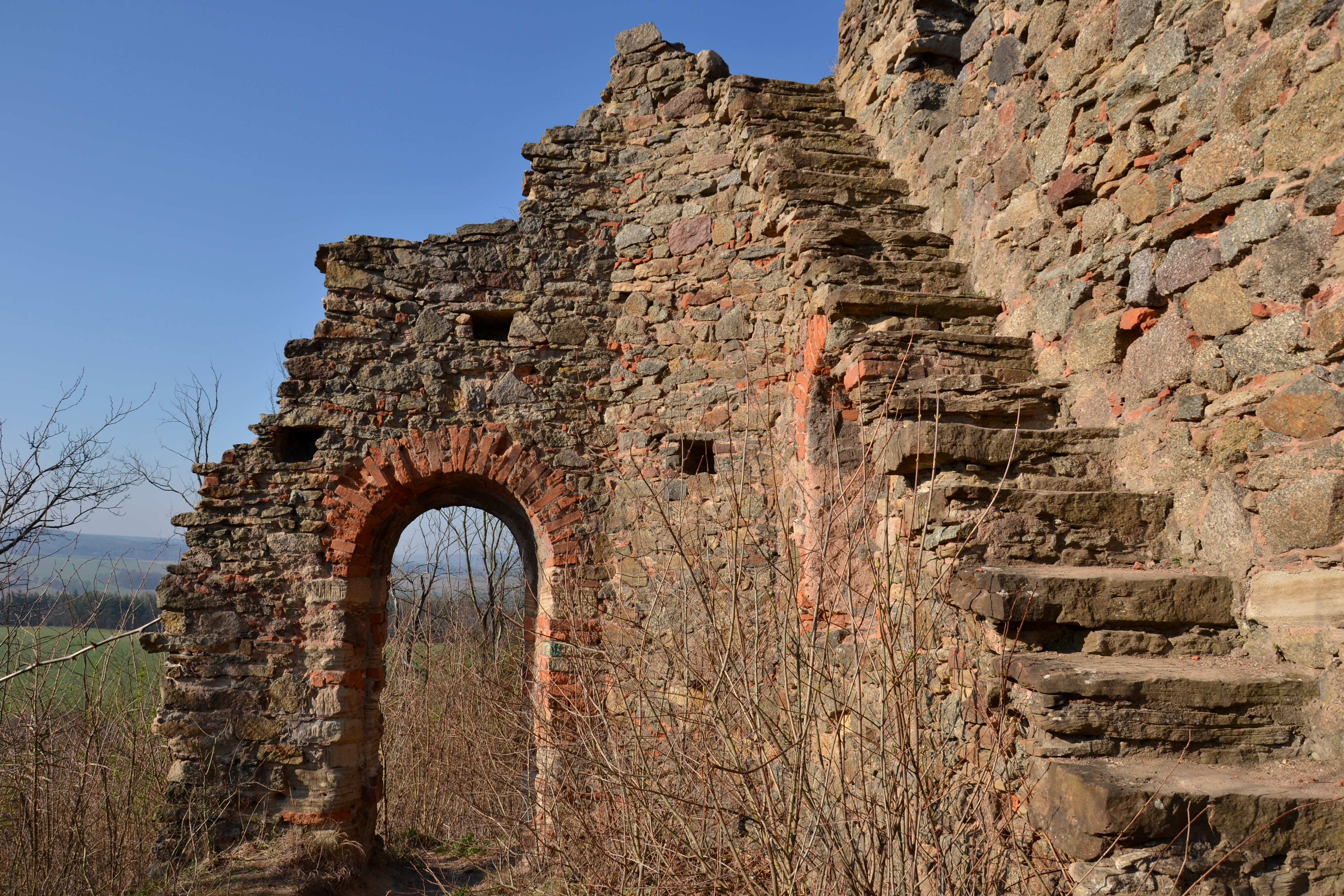 Petrohrad – romantická vyhlídka v podobě umělé zříceniny z 19. století